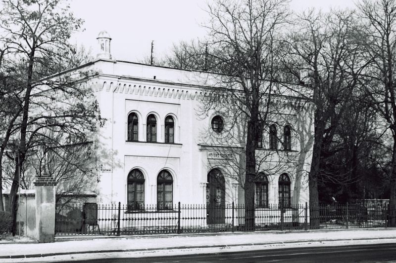 Legnica, żydowski dom przedpogrzebowy, tzw. Dom Wieczności Legnica, Poland, Jewish pre-funeral house, the House of Eternity photo by Jarrus, Jan 2006